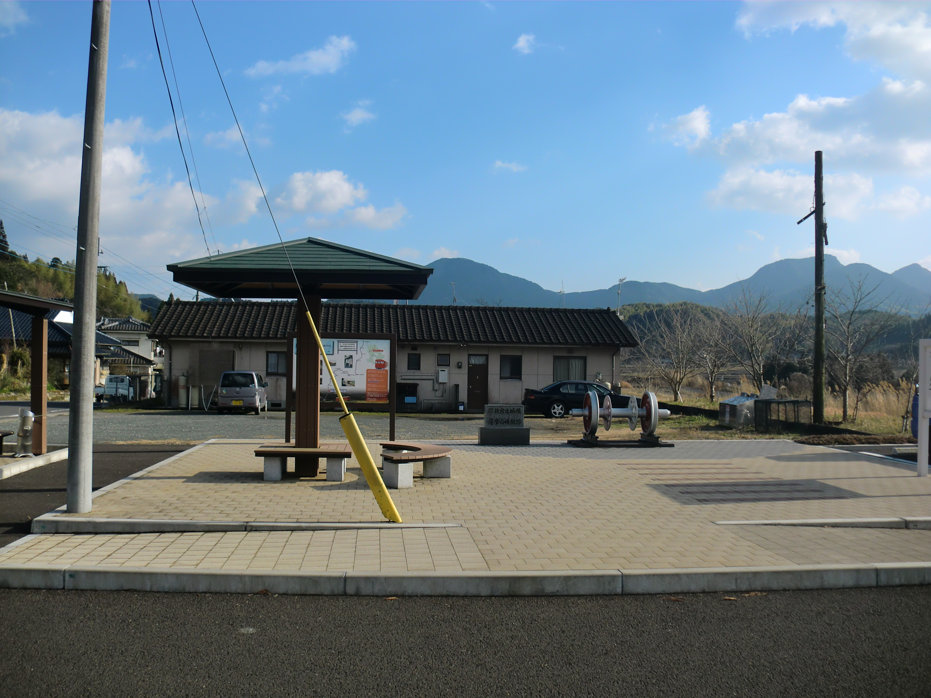 国鉄宮之城線薩摩山崎（さつまやまさき）駅跡